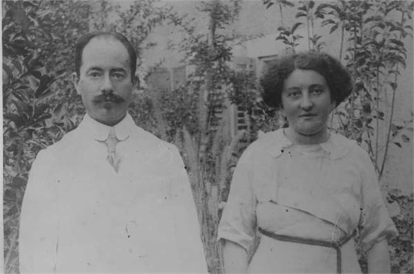 ד"ר ארתור רופין ורעיתו